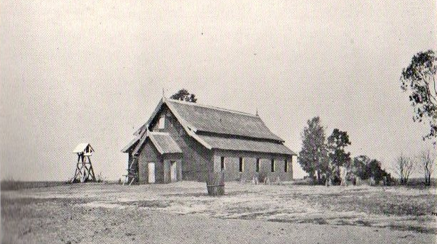 Le temple de Léalouyi au Zambèse.